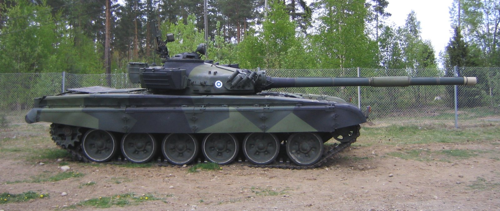 Former Finnish Army T-72 Tank in Parola Tank Museum, Finland. T-72 panssarivaunu Panssarimuseossa Parolassa. Own work. Oma kuva.